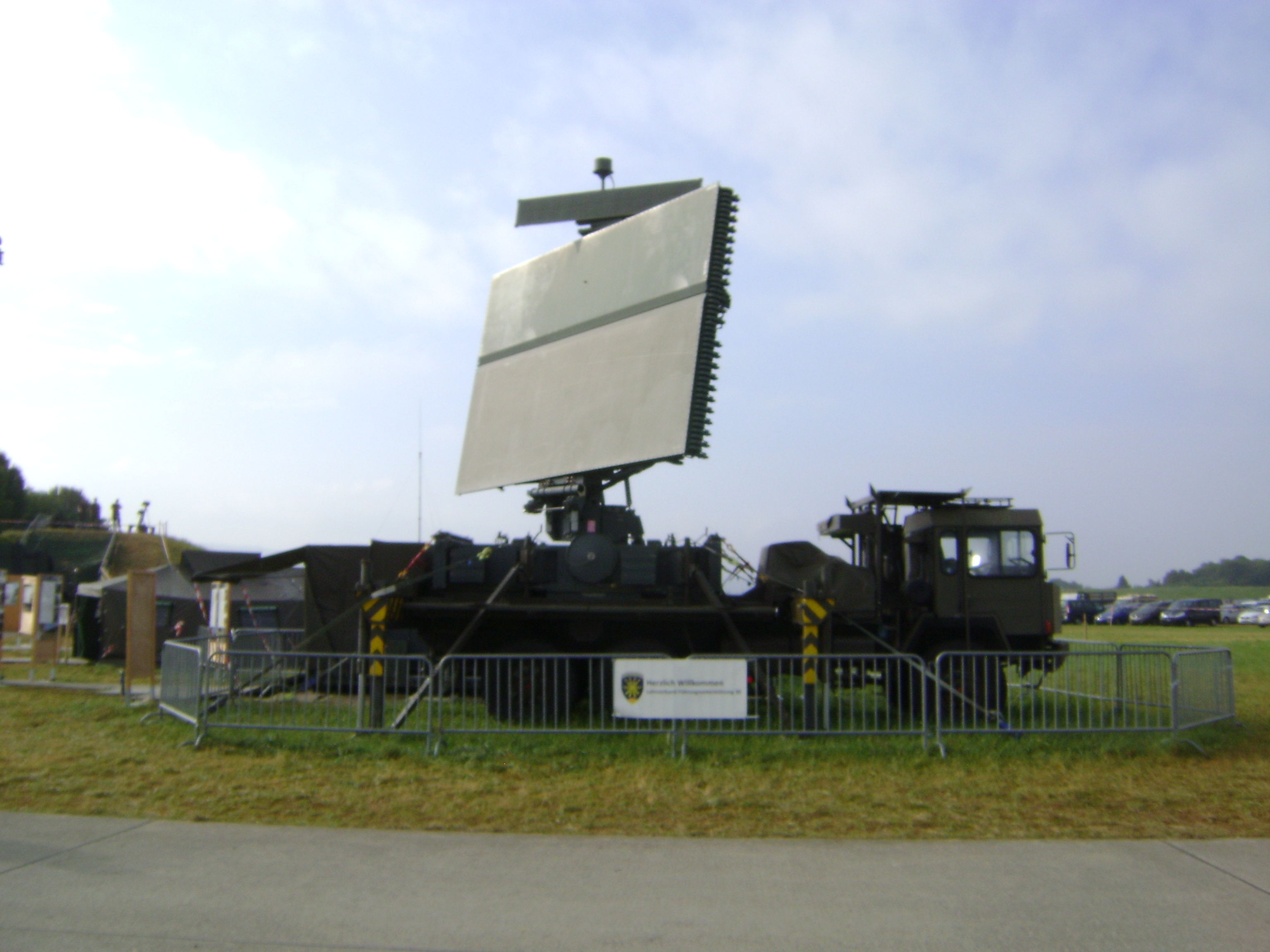 TAFLIRTRUCK